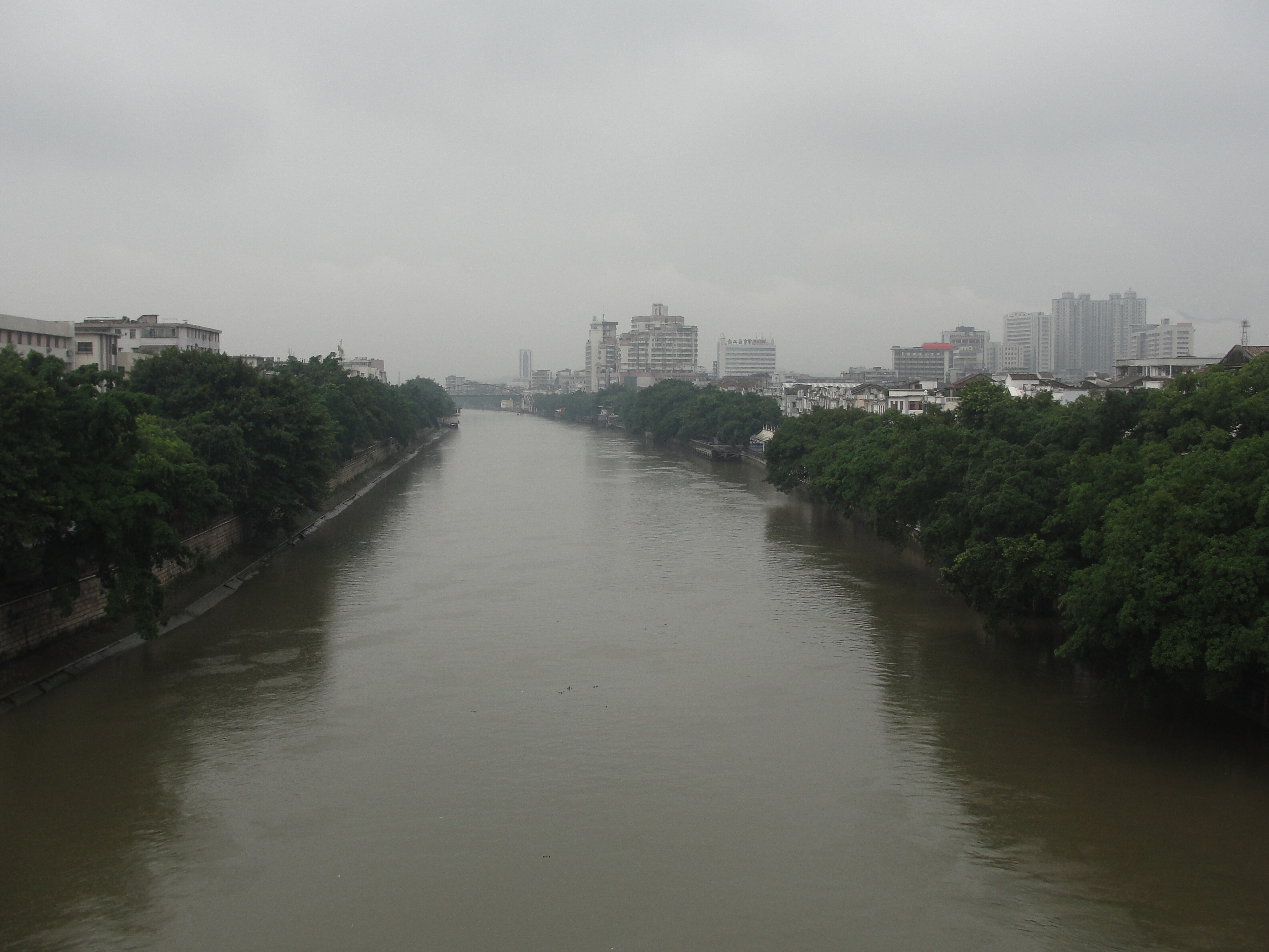 2011年的长堤两岸,从蓬江大桥上拍摄